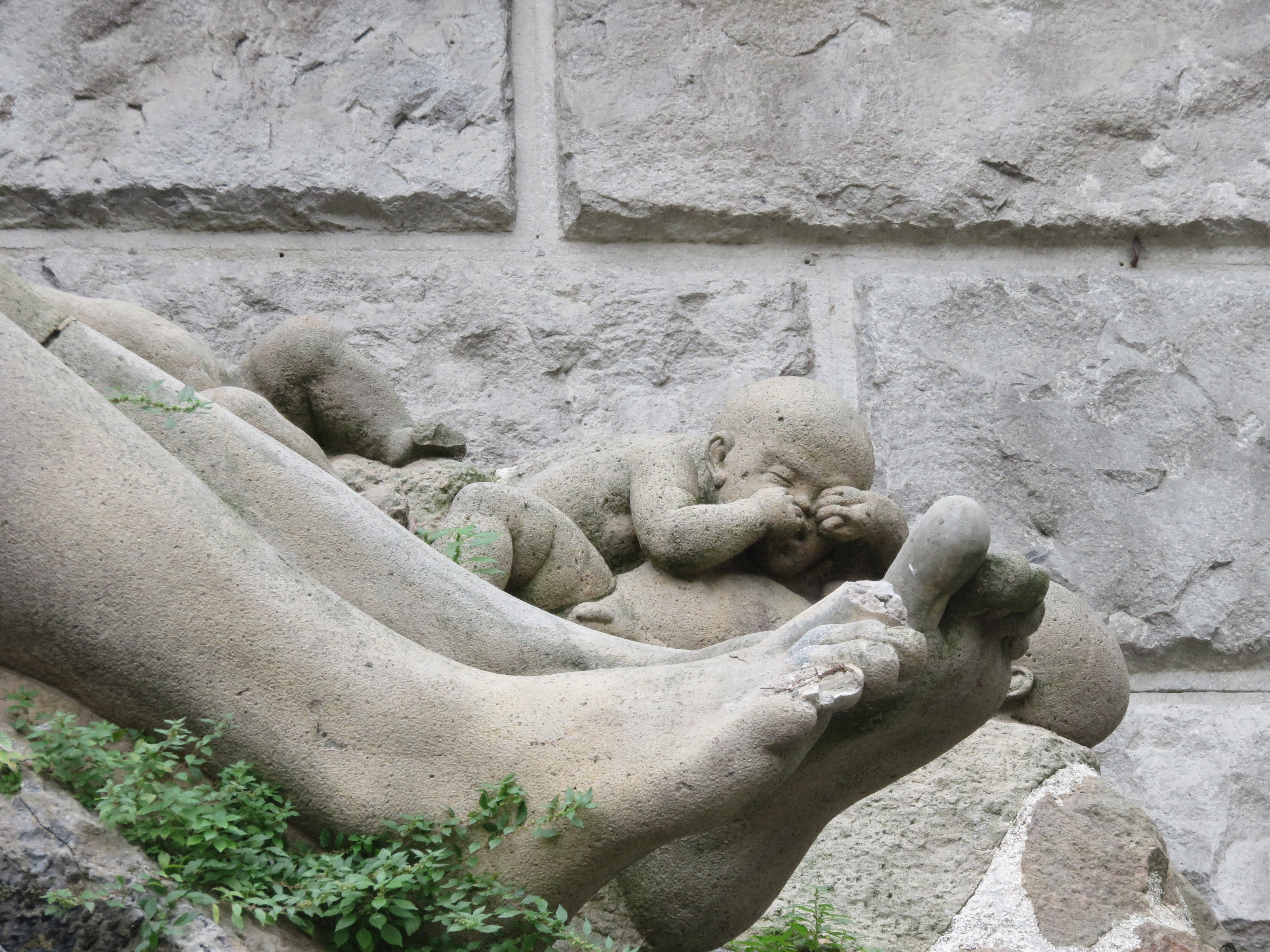 Il Po e i suoi affluenti. Fontana realizzata in cemento armato da Arrigo Minerbi per l'acquedotto monumentale di Ferrara in piazza XXIV Maggio. Particolare.